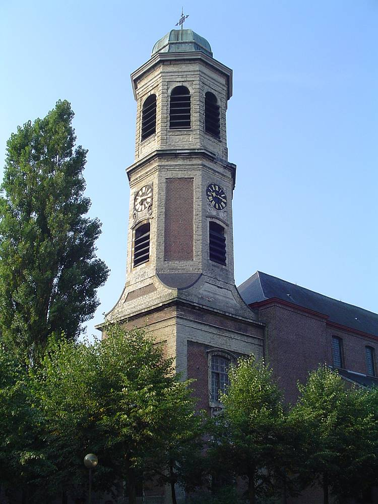 Sint-Gerulphus kerk Drongen (Gent) gelegen in het centrum van Drongen